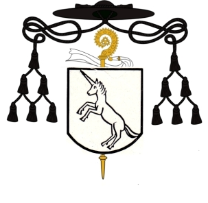 Wappen Johannes Cassianus Speiser, 1583 - 1640, Abt von Münsterschwarzach (1628-1640)